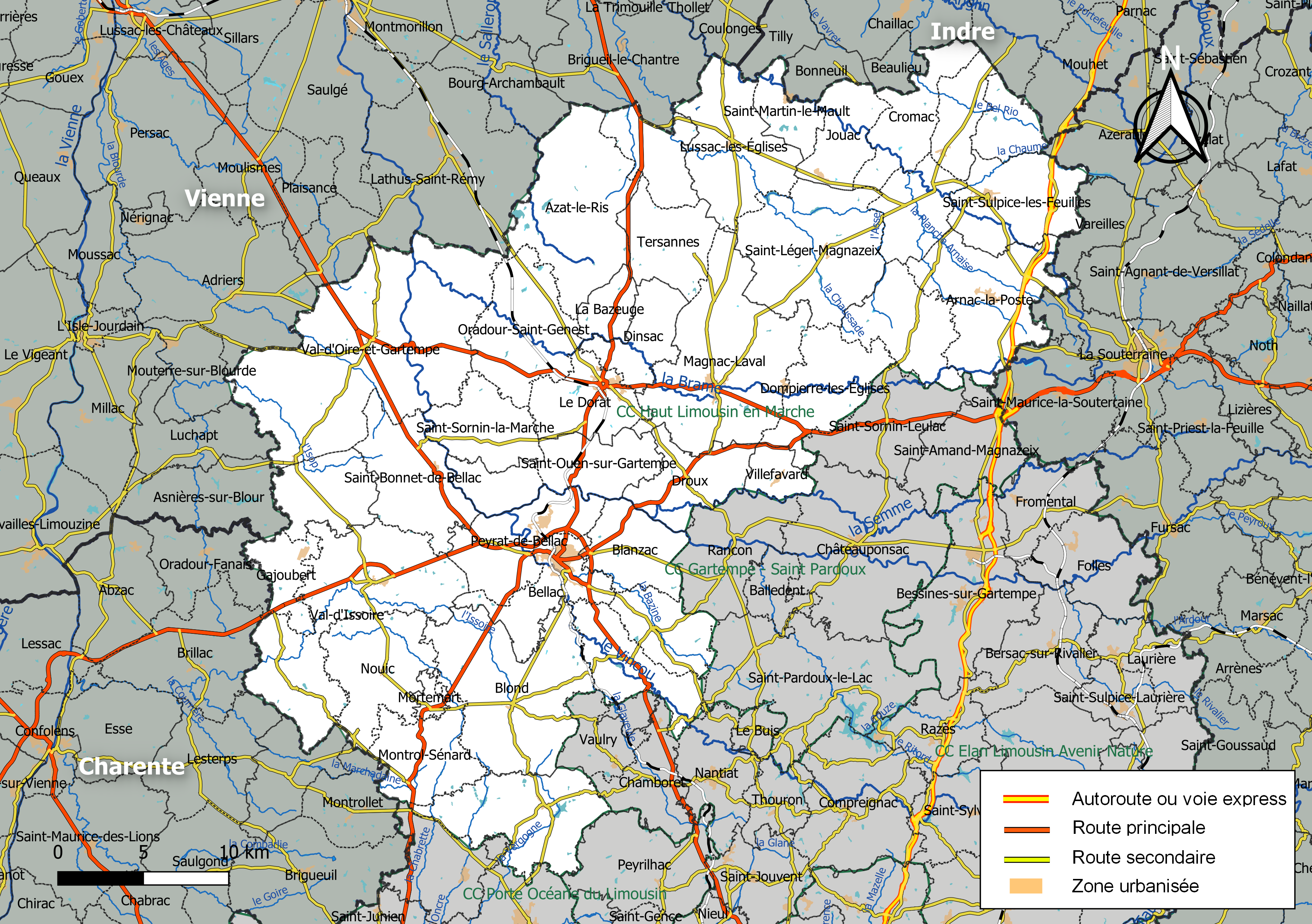 Carte géographique de la Communauté de communes Haut Limousin en Marche, département de la Haute-Vienne, France. Composition au 1er janvier 2019.